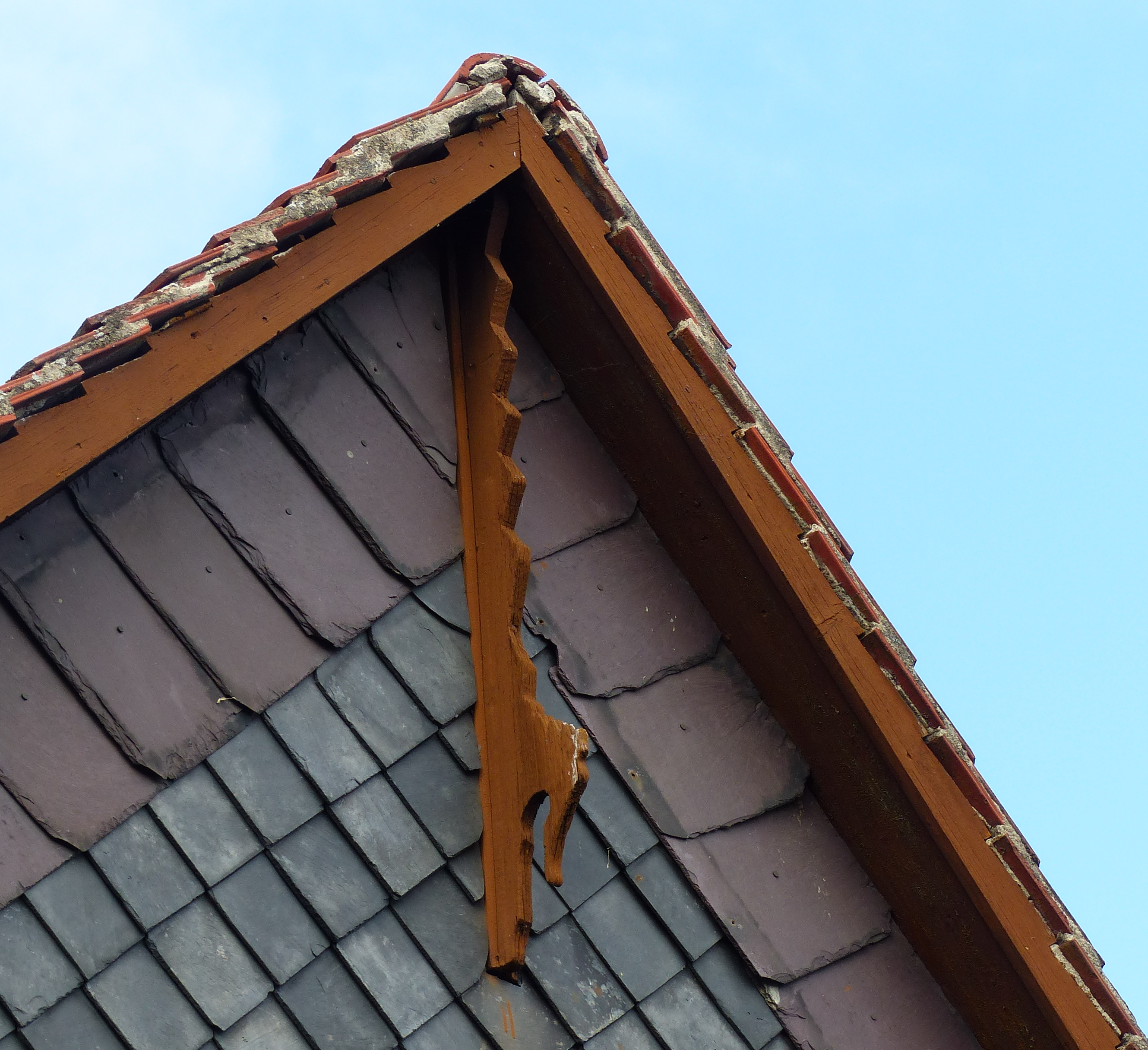 Umgebindehaus, Niedere Hauptstraße 33, Niedercunnersdorf